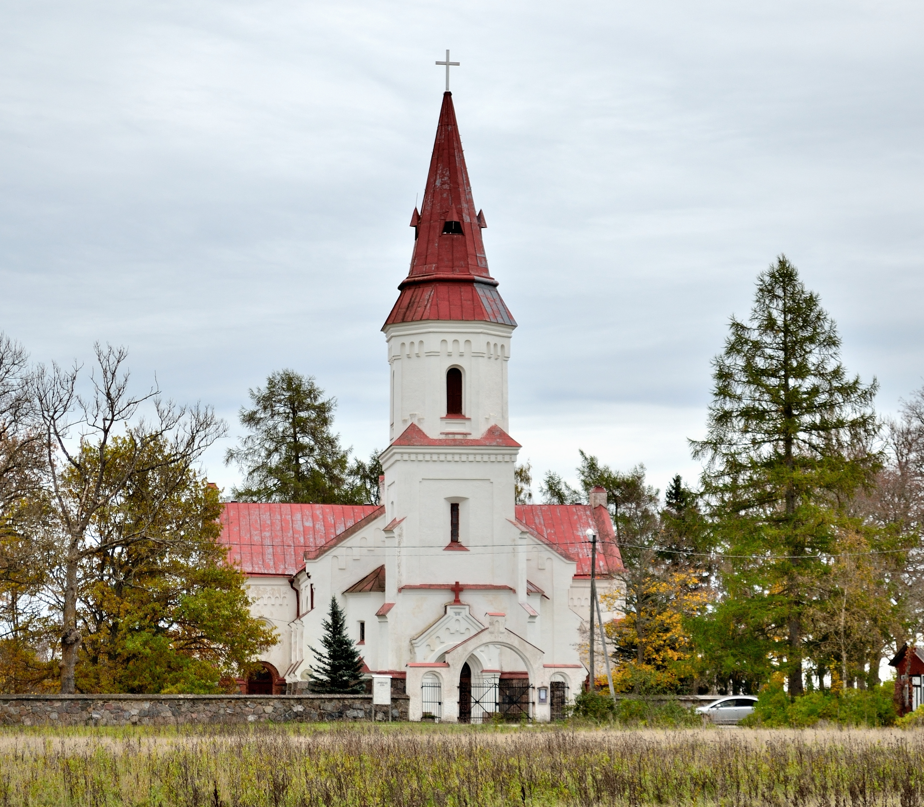 Hageri kirik